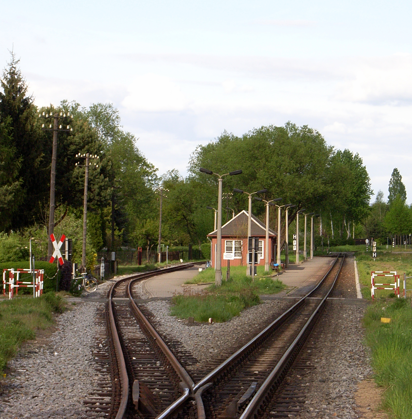 Tram Bahnhof in Zittau (Zittau-Süd)